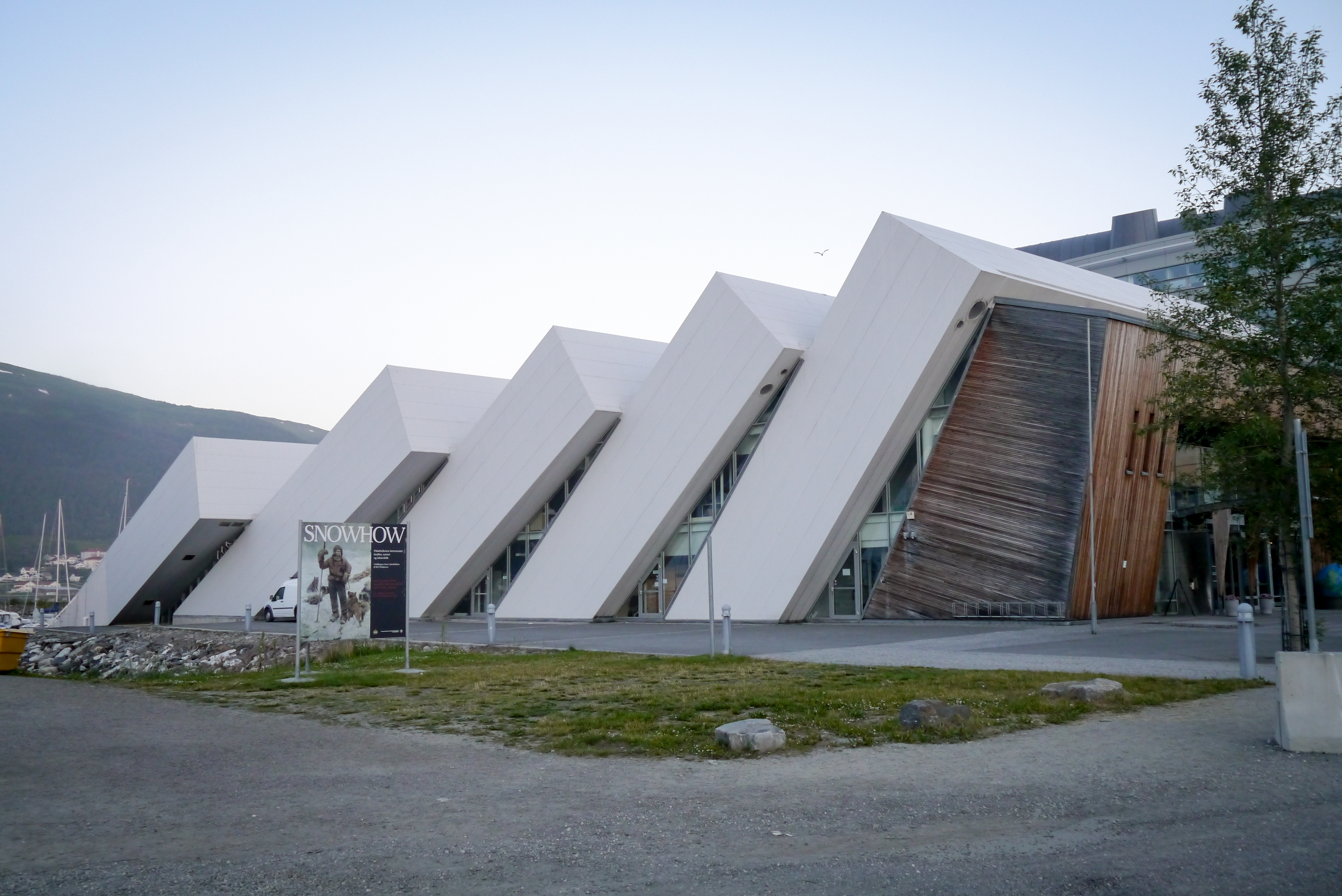 norway2014-1080171